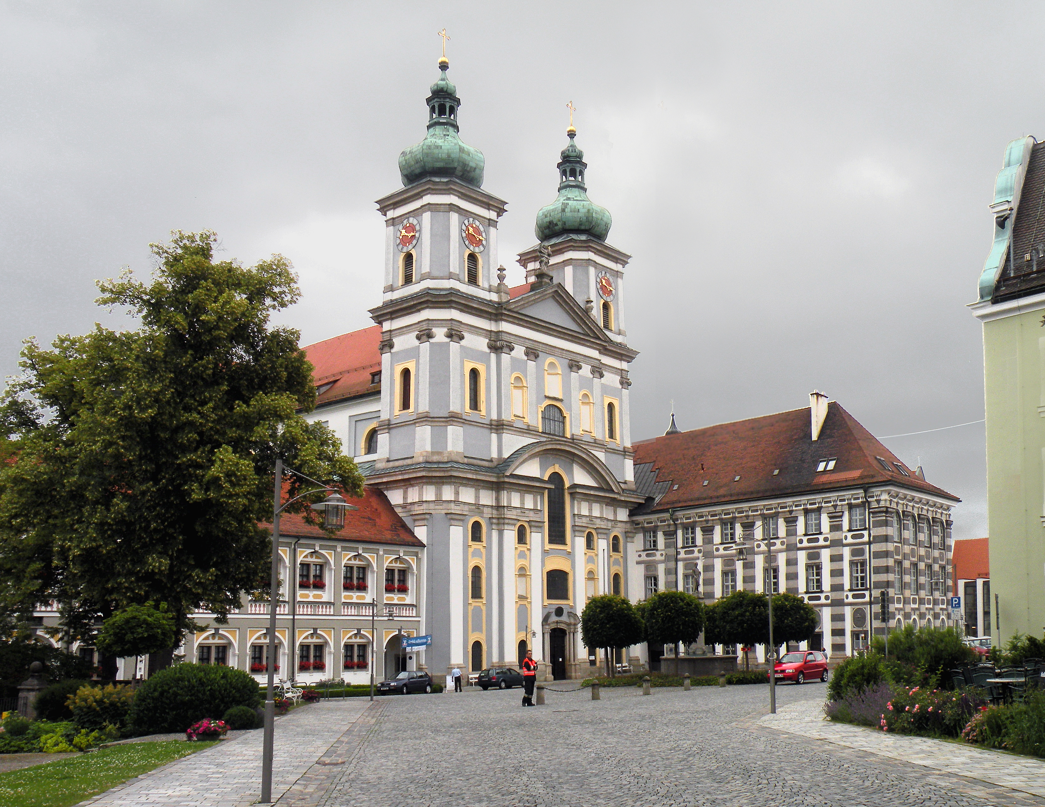 Монастырь в Вальдзассене